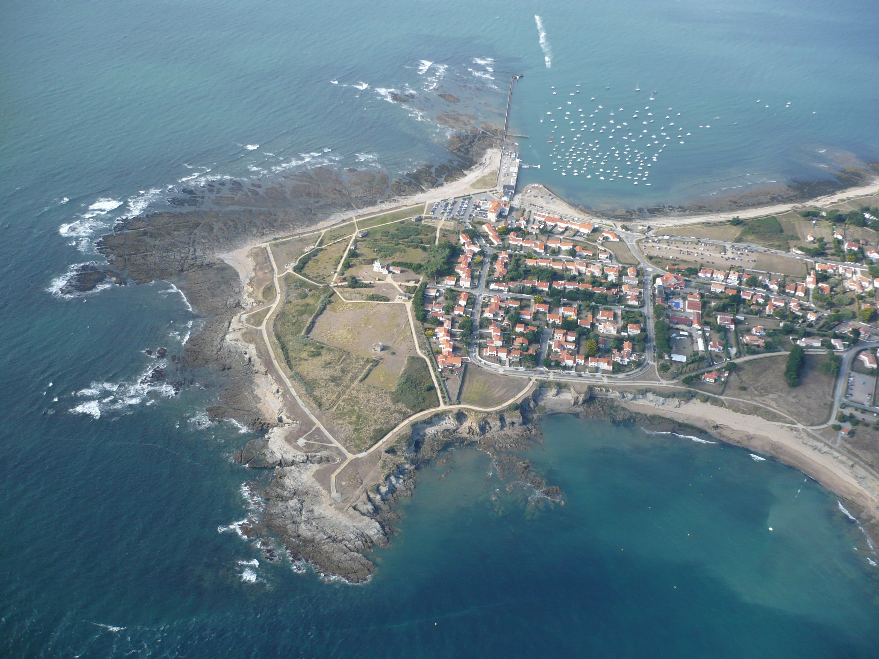 Photographie de la Pointe Saint-Gildas prise depuis un ULM.